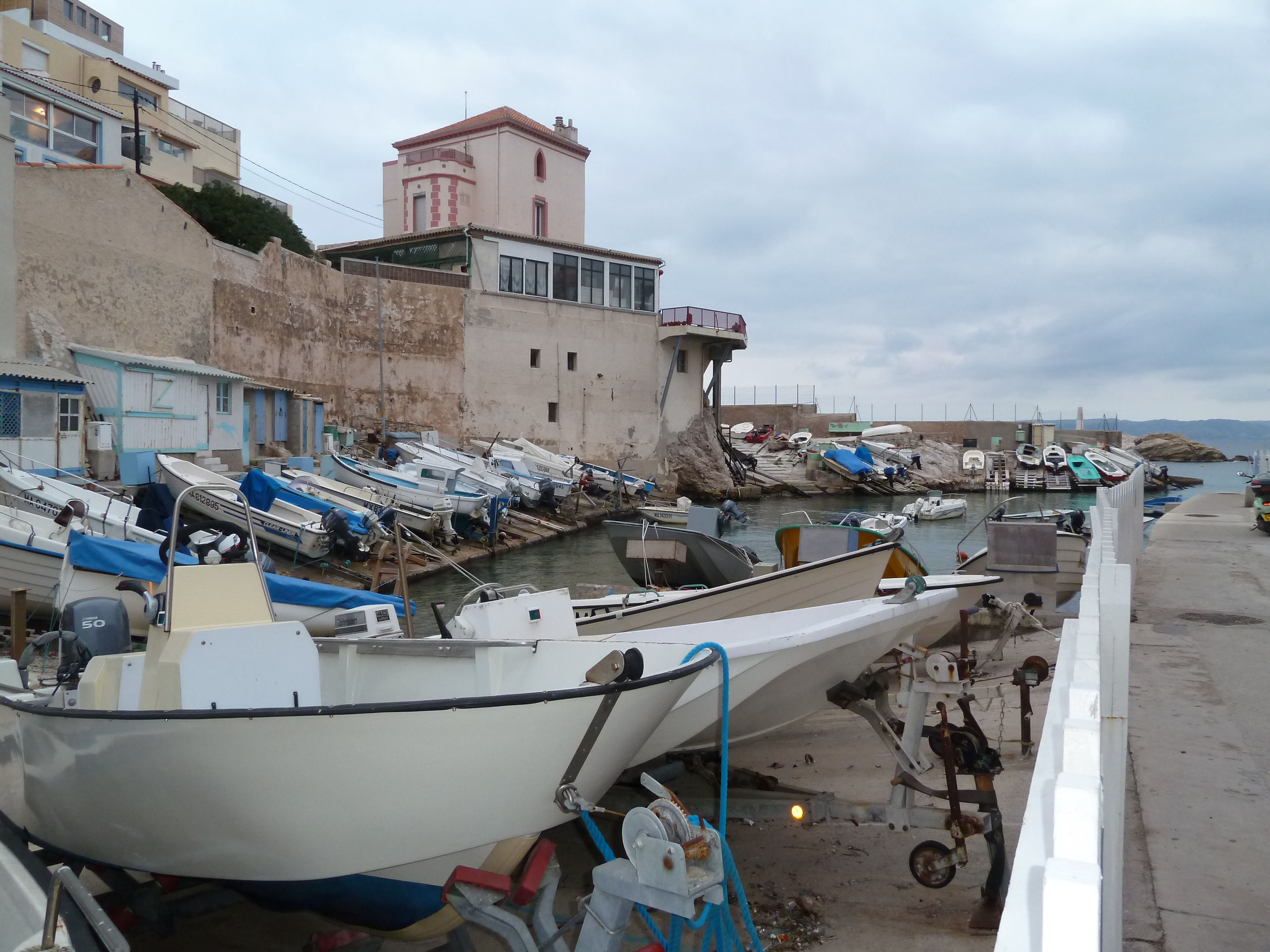 L'Anse de Malmousque dans le quartier d'Endoume à Marseille.